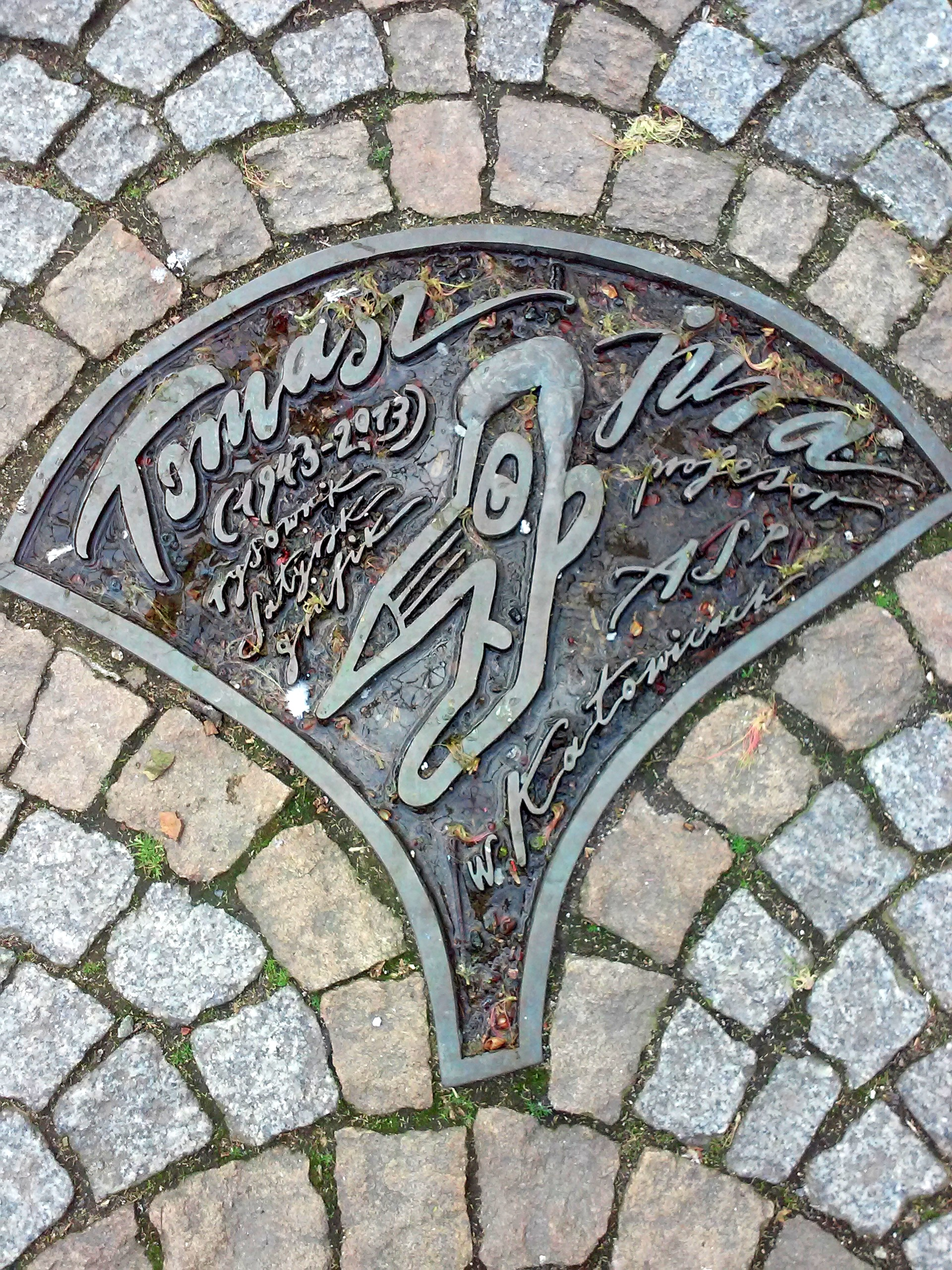 Legnica, Aleja Gwiazd Satyrykonu, tablica pamiątkowa - Tomasz Jura